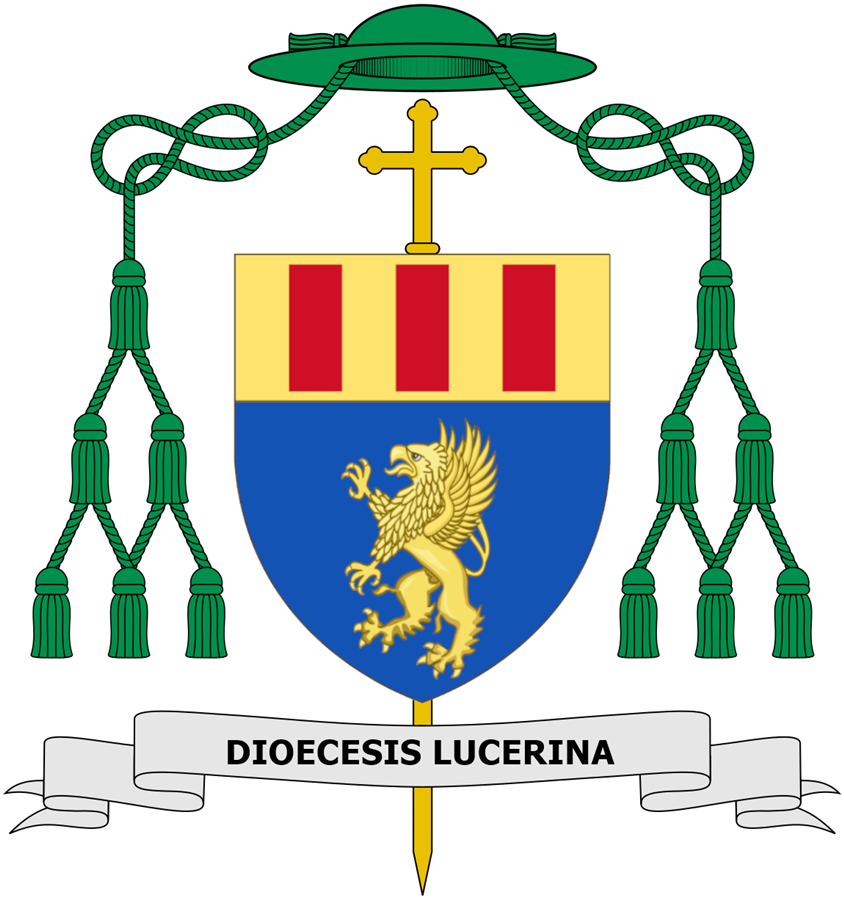 Stemma della famiglia Monaco d'Avignone e Napoli, utilizzato da Giulio Monaco, vescovo di Lucera.